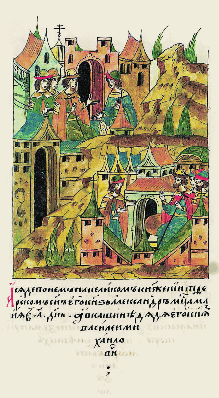 А сел после него на великом княжении Твер- ском сын его князь Александр месяца мая в 1 день, а в Кашине — дядя его князь Васи- лий Михайлович.